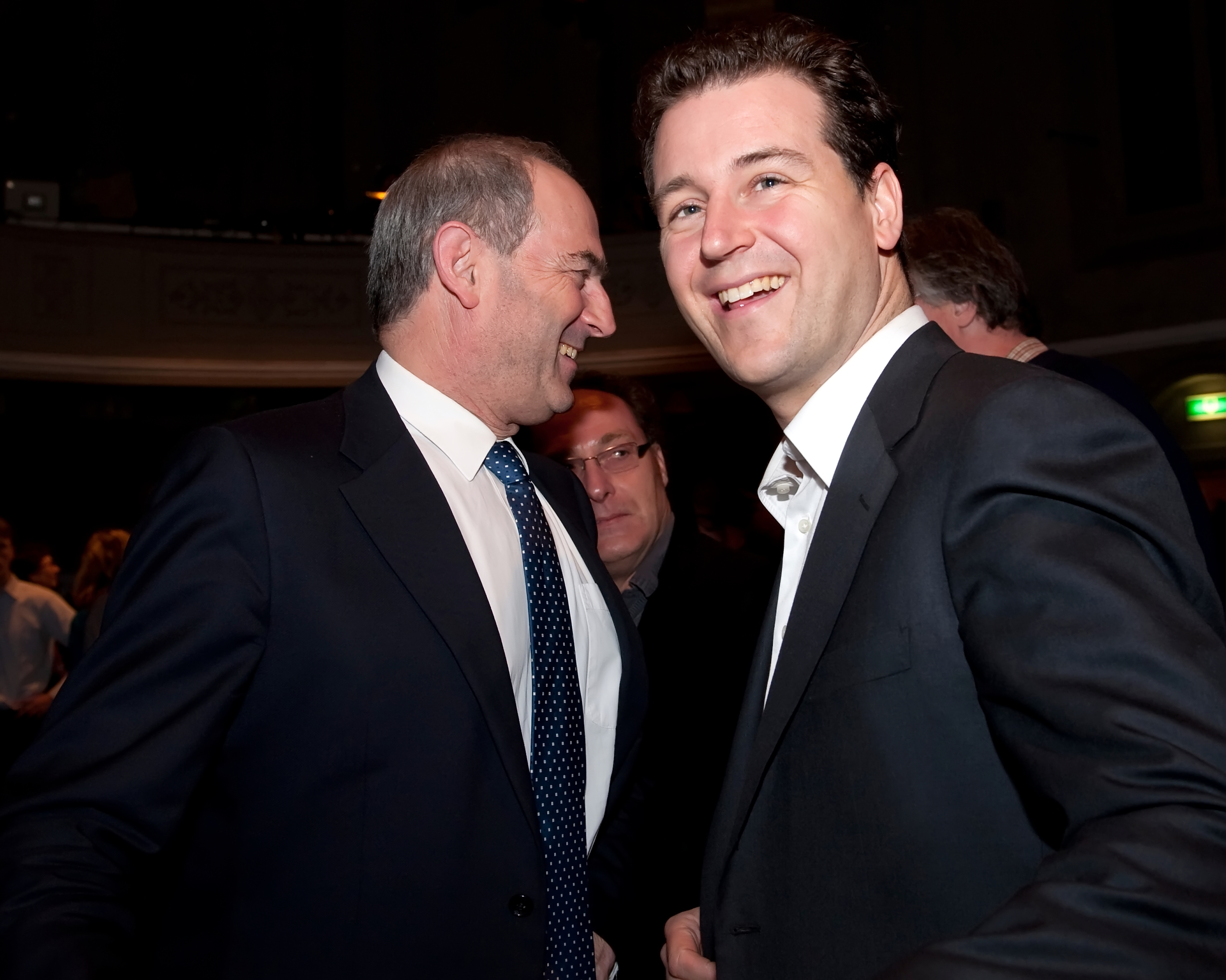 Sinds zaterdag 30 januari ligt het nieuwe boek van Lodewijk Asscher, ´De ontsluierde stad`, in de winkel. Het boek werd op 3 februari gepresenteerd bij Felix Meritis in Amsterdam. Ook op NU